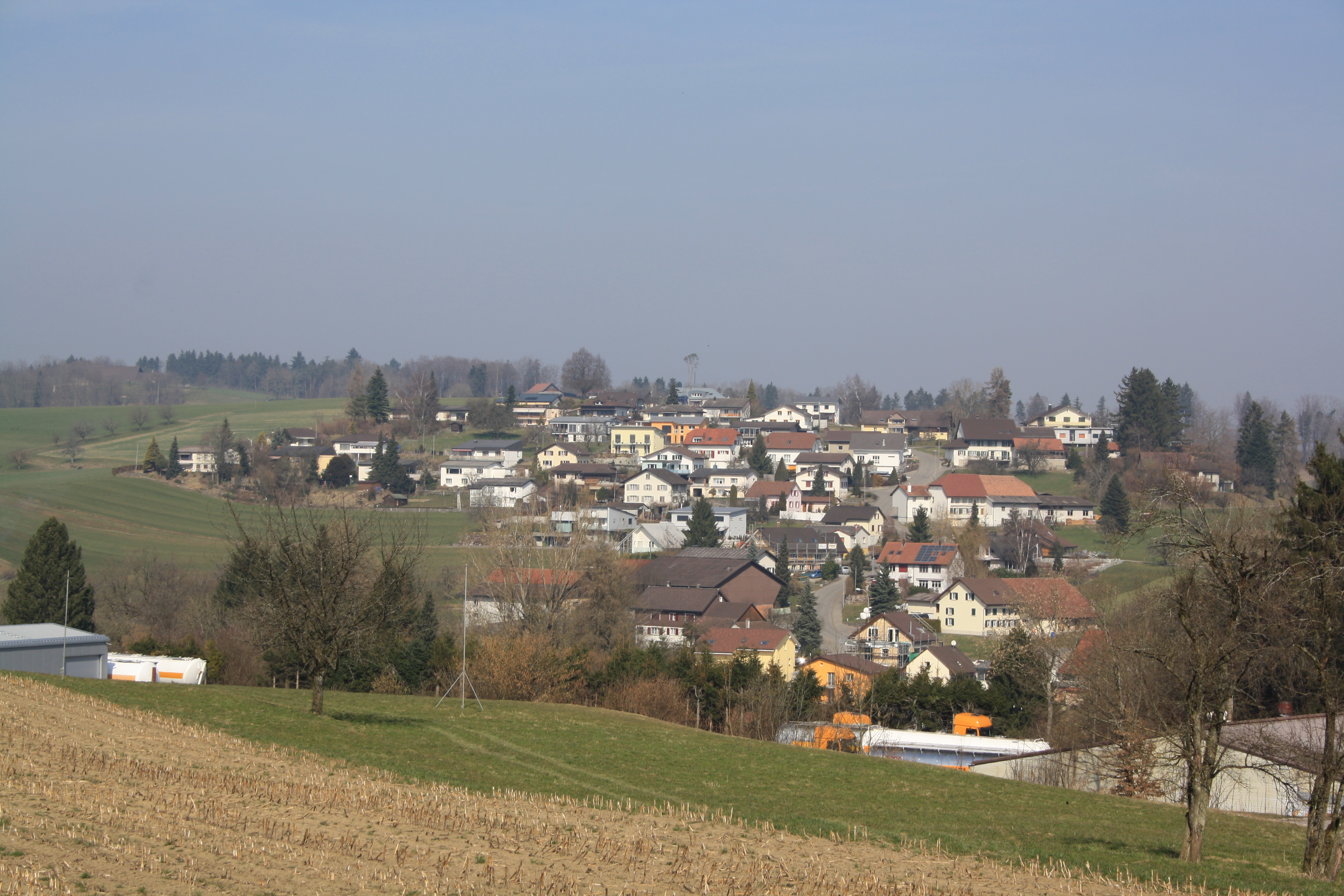 Dürrenäsch